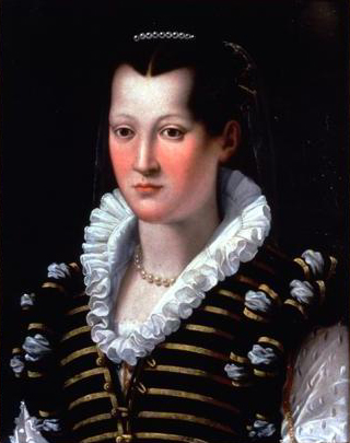 Porträt Isabella de’ Medici (1542-1576)